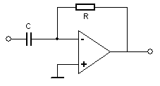 Differentiator met opamp - kopie van Duitse wiki - auteur:Radizz - licentie: GNU FDL